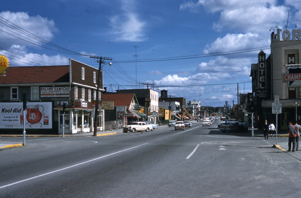 Diapositive couleur illustrant la rue Centrale de la municipalité de Val-d’Or dans la région administrative de l’Abitibi-Témiscamingue.